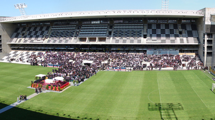 Foto panorãmica do estádio do Bessa (Boavista FC) durante a missa da benção das pastas da queima das fitas, do Porto, 2007 Tive que pedir a 30000 pessoas para ficar quietinhas enquanto tirava as fotos ;)